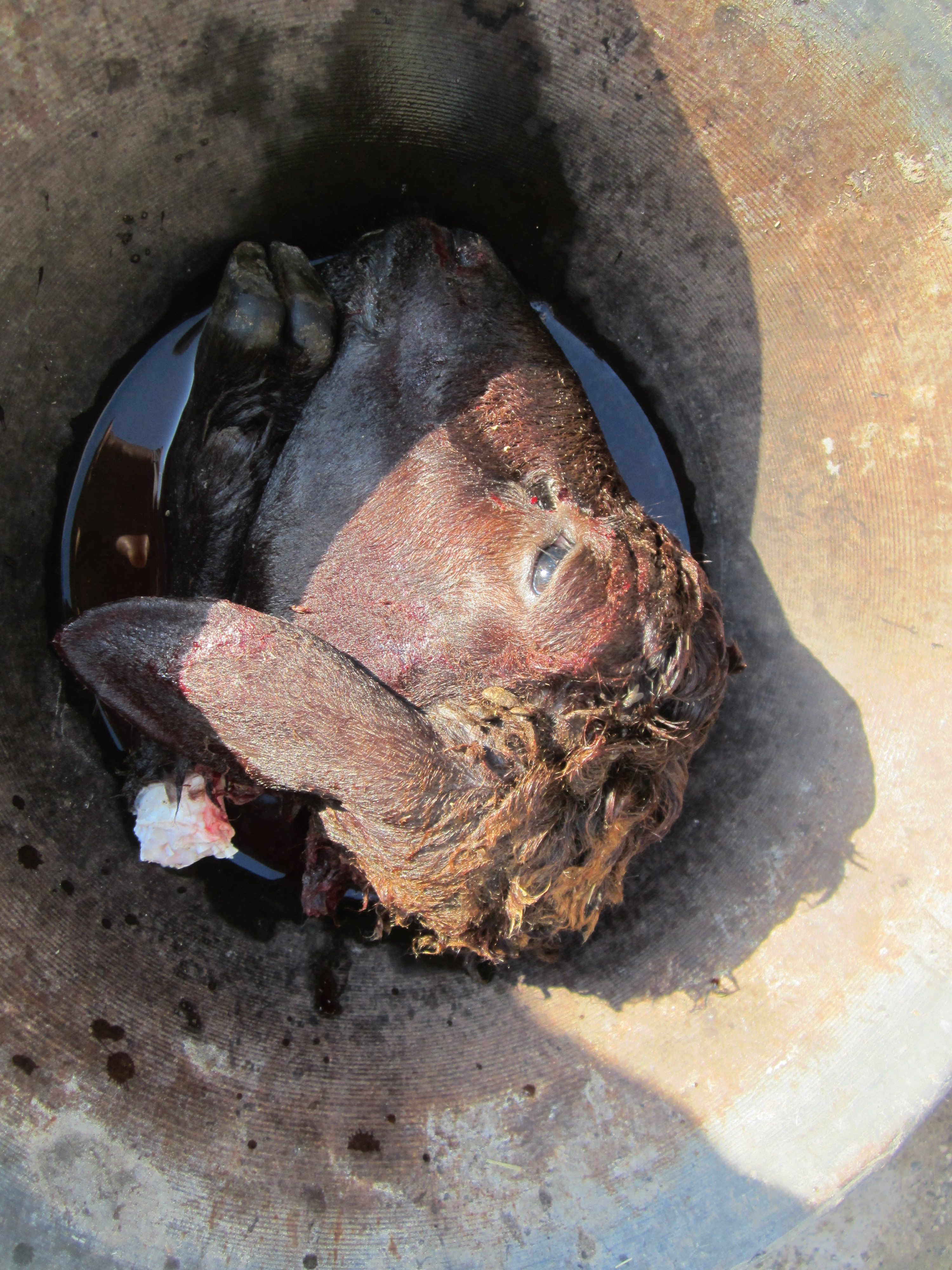 مازِرونی: قروونی ِکله و لینگ